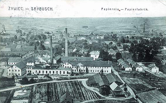 Fabryka Papieru w Żywcu, pocz. XX wieku